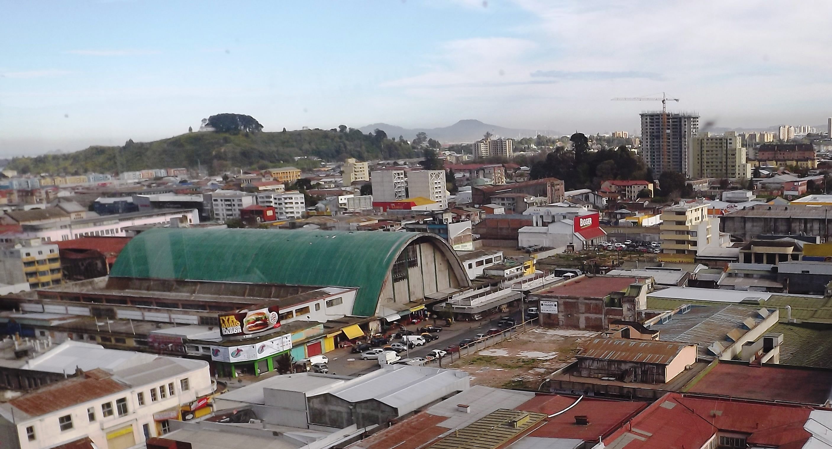 Vista Aerea del mercado Central